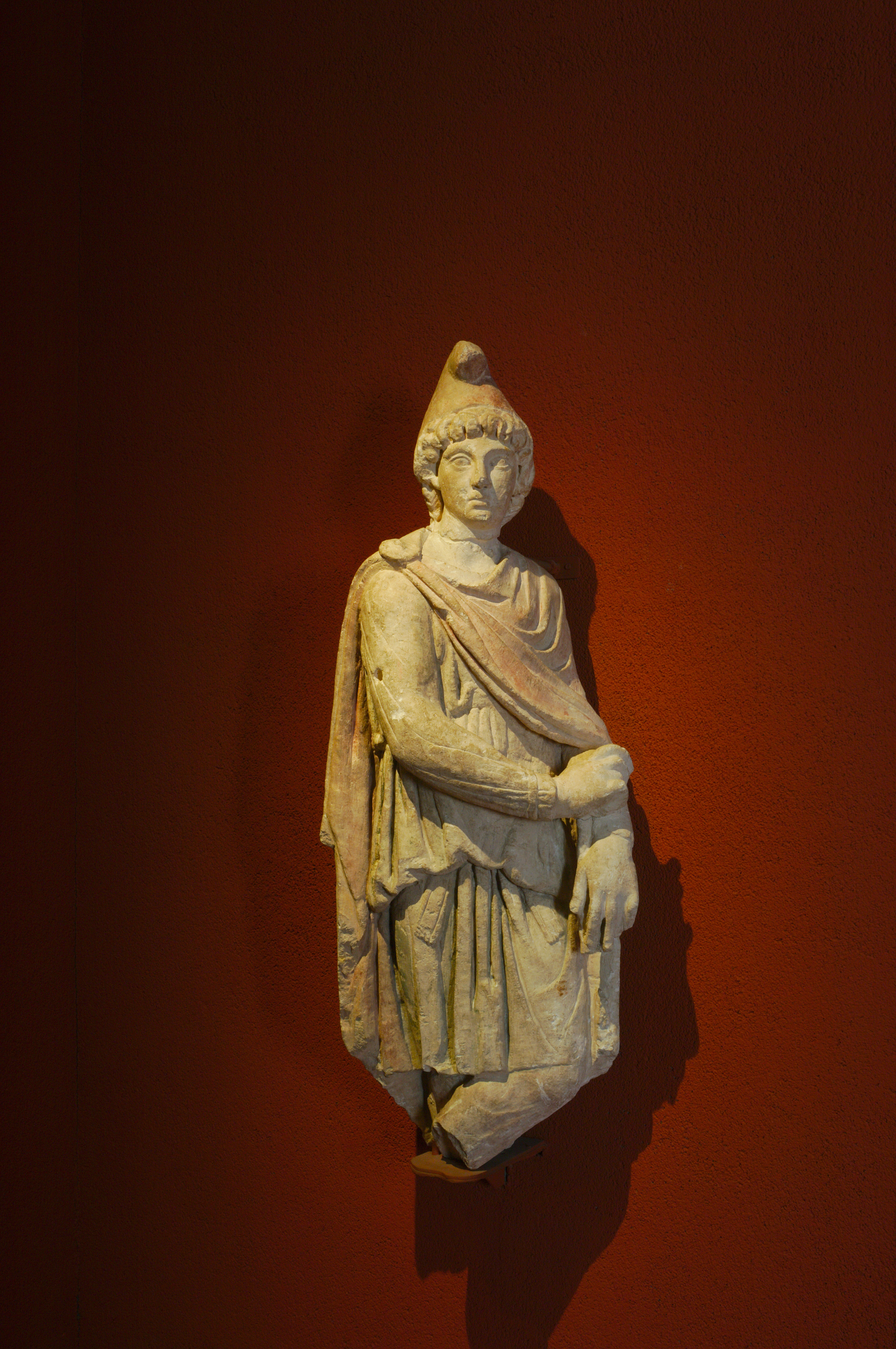 Bordeaux, fouilles 146 cours Victor-Hugo en 1986 Fin du IIe siècle (1ère moitié du IIIe siècle). Calcaire Musée d'Aquitaine. Inventaire : 87.1.50